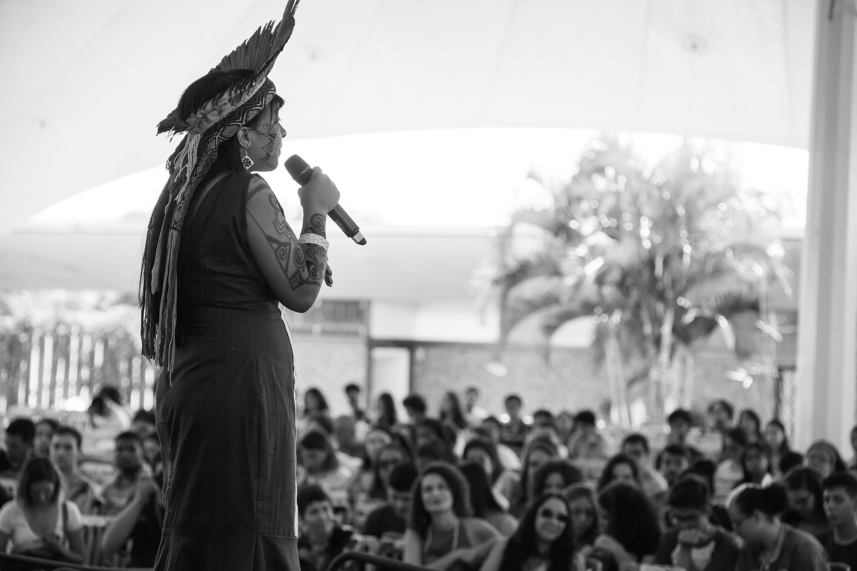 InspiraUnB, cerimônia de boas-vindas aos calouros do 2º semestre de 2018, com a participação da líder indígena Célia Xakriabá. Foto:Raquel Aviani / Secom UnB. ATENÇÃO – As informações, as fotos e os textos podem ser usados e reproduzidos, desde que a fonte seja devidamente citada e que não haja alteração de sentido em seus conteúdos. Crédito para fotos: nome do fotógrafo/Secom UnB